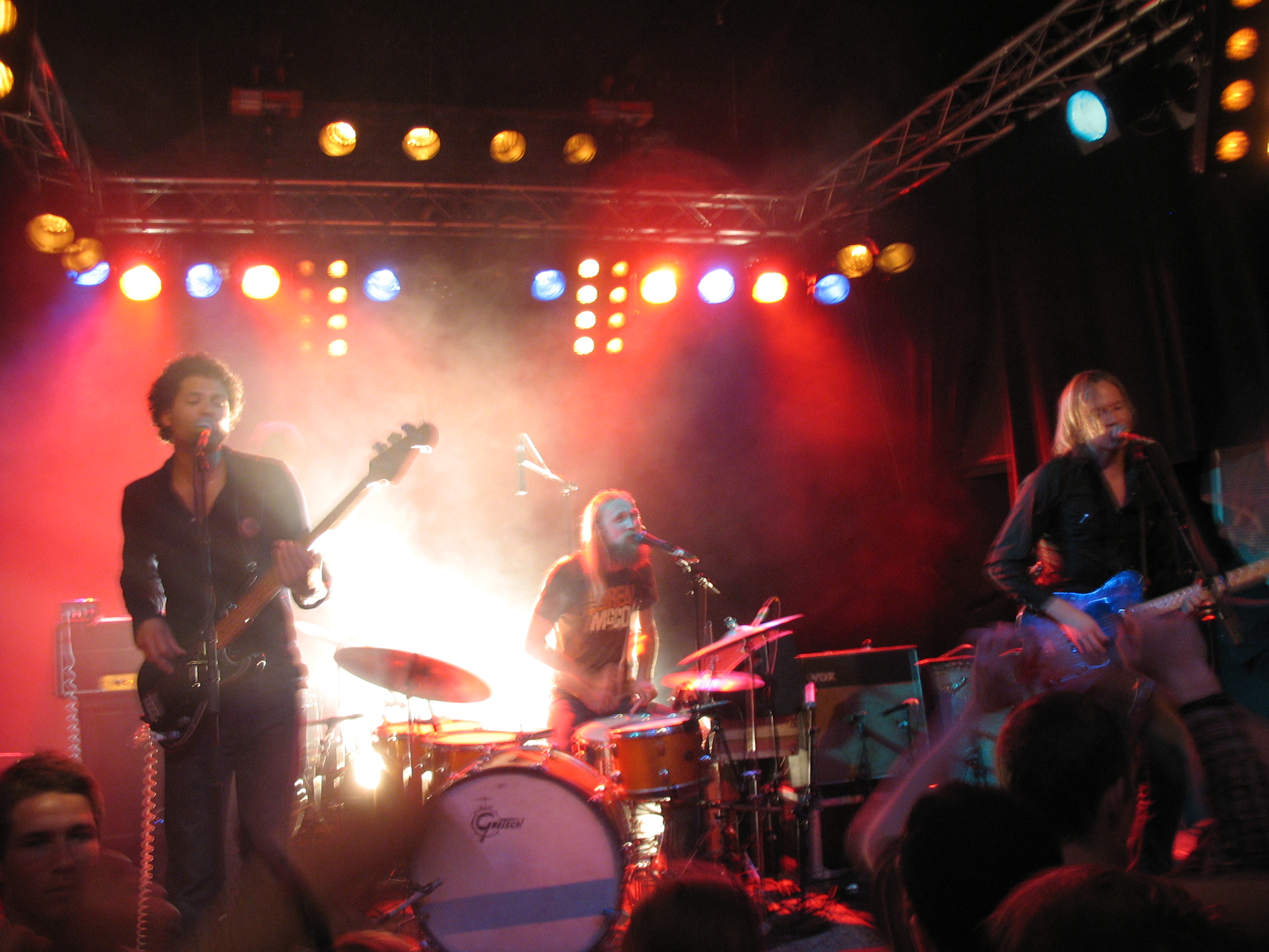 Bigbang på EnergiMølla 2007